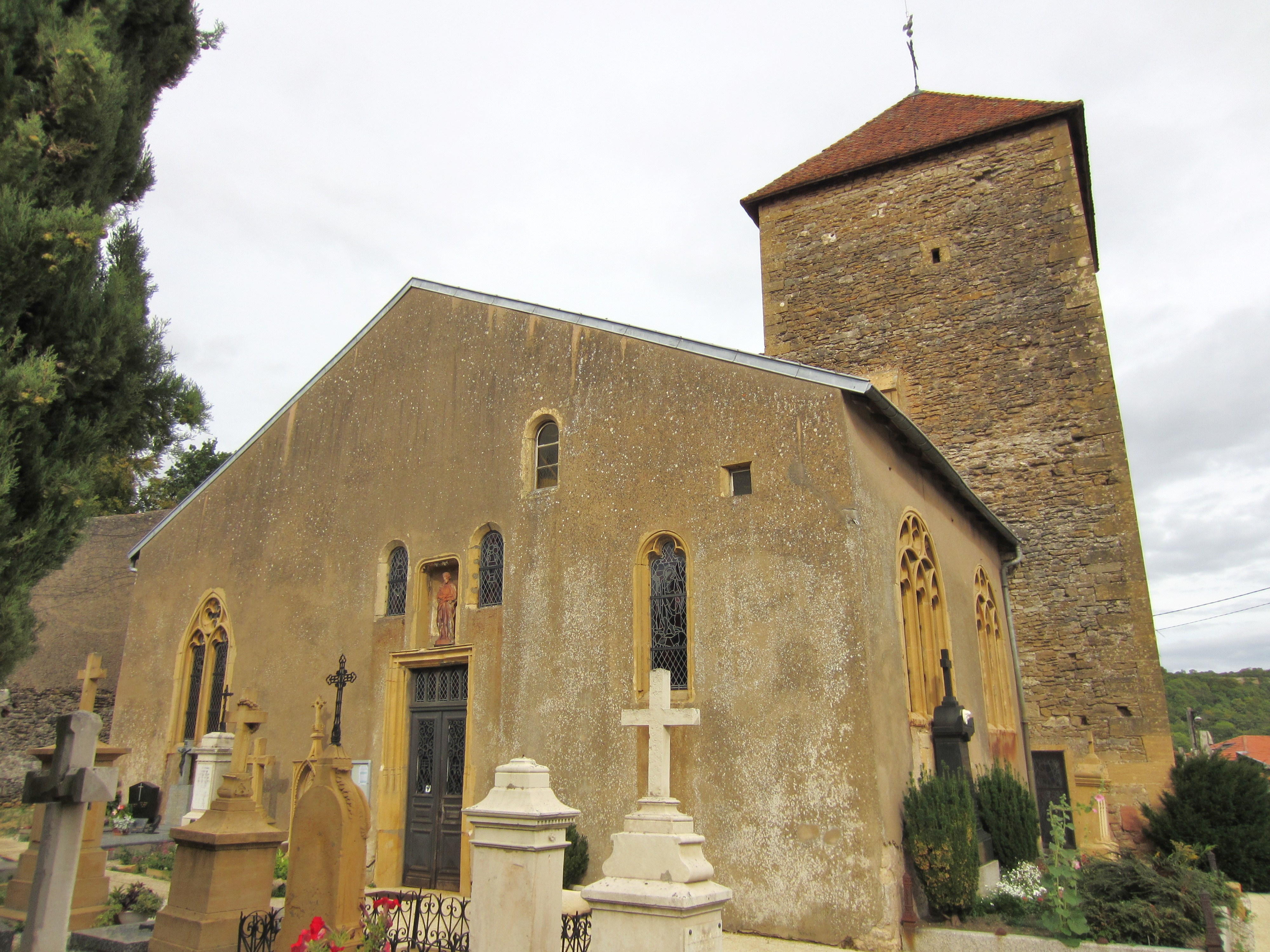 Description eglise Saint Gorgon Lessy Date7 September 2011Sourcemon appareil photoAuthorAimelaimePermission(Reusing this file) eglise Saint Gorgon Lessy